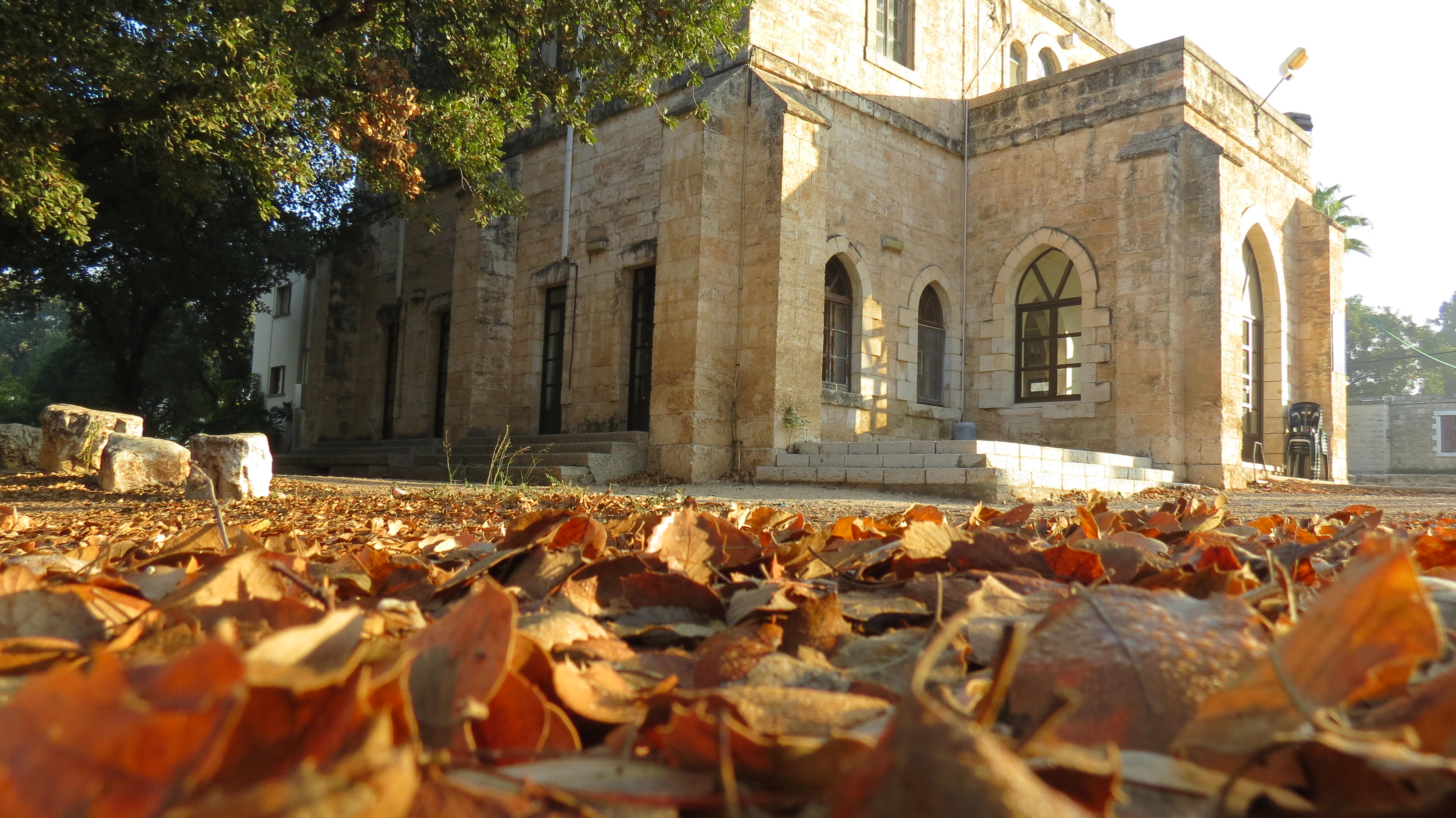 היישוב המודרני הראשון באיזור בית לחם הגלילית הוקם על ידי הטמפלרים ב-1906.